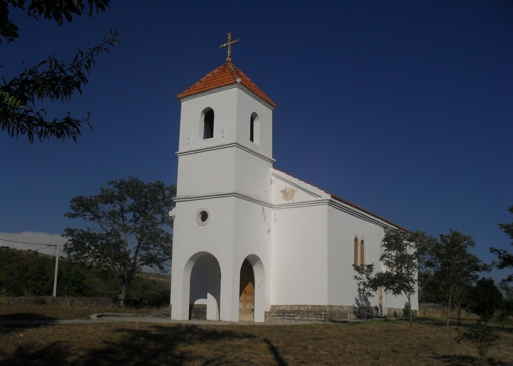 Храм Српске православне цркве Свете Недјеље у Кожловцу, Далмација